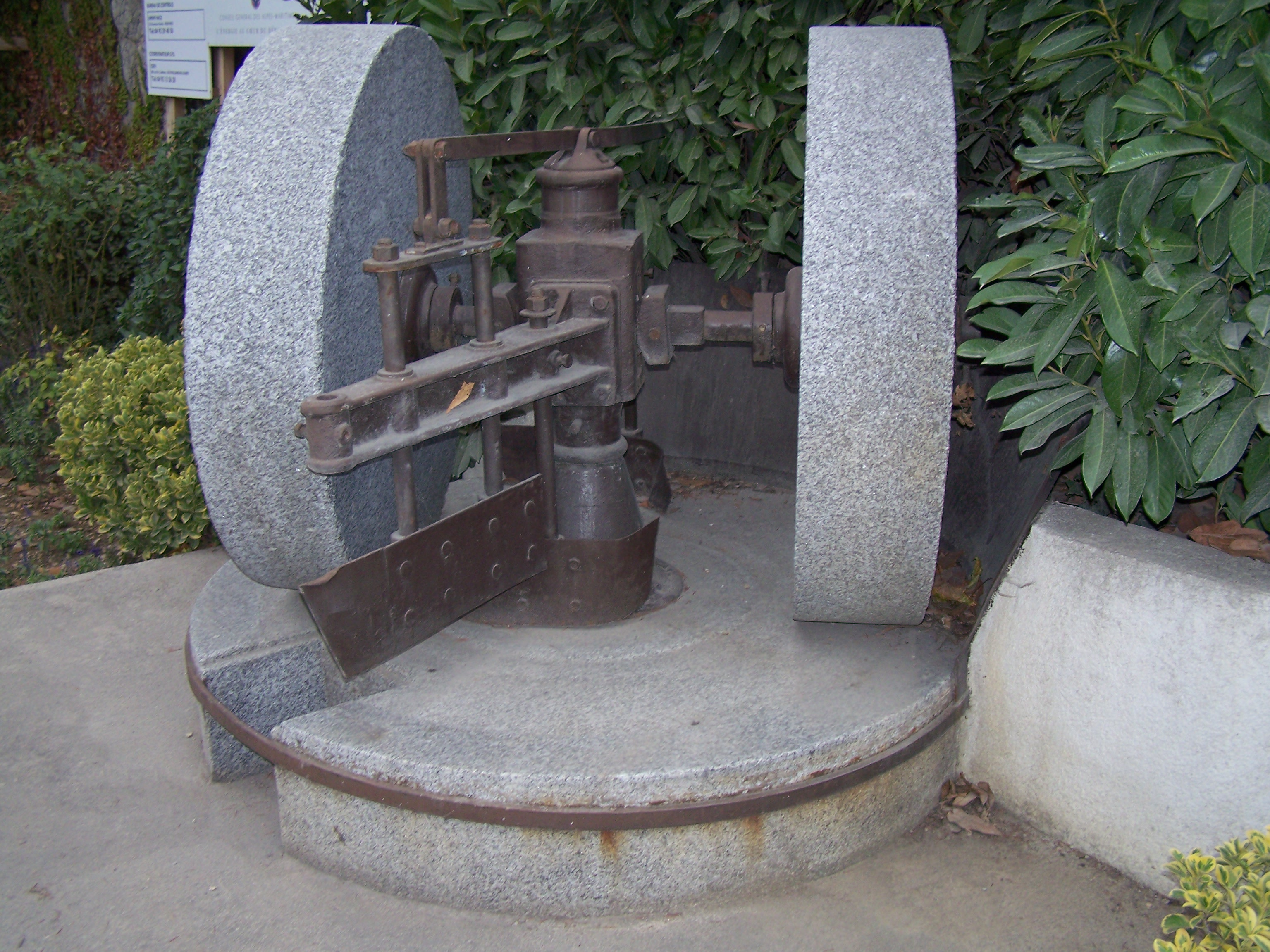 anciennes meules ("molla") d'un moulin à huile exposées sur la voie publique du village de Levens (Alpes-Maritimes, France)